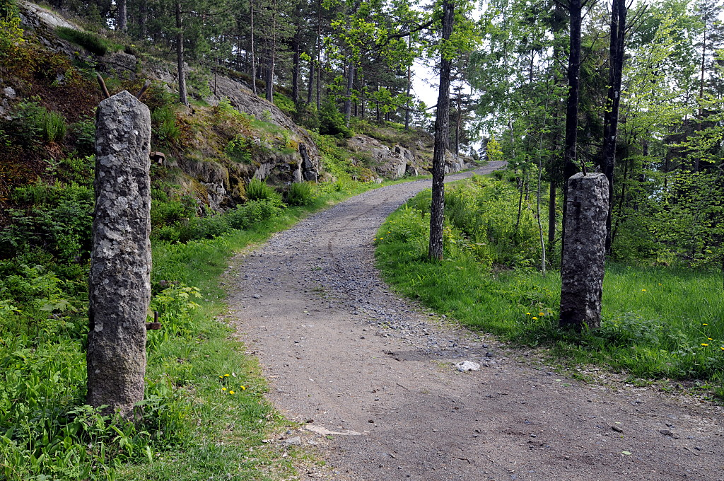 Sundås batteri i Stokke kommune